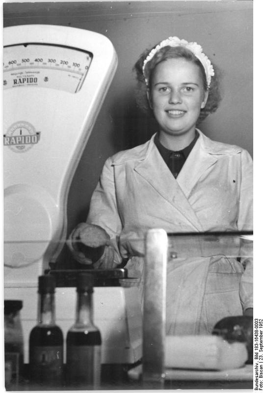 Zentralbild Biscan 23.9.1952 Str-Zu. Bereit zum Dienst für Deutschland. Pionierleiterin Anneliese Fröhlich, Lehrling in der HO-Lehr-Verkaufsstelle Nr. 31 in Magdeburg-Westerhüsen, erklärt: "Die neue Note der Sowjetregierung an die drei Westmächte zeigt uns wieder, wie sehr das Sowjetvolk den Frieden liebt. Aus diesem Anlass verpflichte ich mich, noch in diesem Jahr, spätestens nach Beendigung meiner Lehrzeit in die Organisation "Dienst für Deutschland" einzutreten. Ich will so dazu beitragen, meinem Volk eine schönere Zukunft aufzubauen."